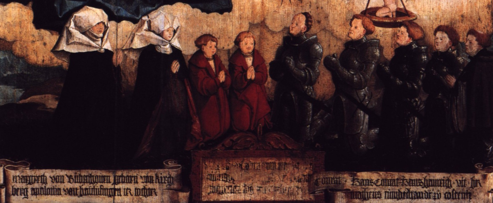 Die Familie von Bubenhofenvon links nach rechts: Margarethe von Klingenberg (falsch als Kirchberg beschriftet), deren Tochter Apollonia von Hailfingen (nicht Haichifingen), zwei Knaben in roten Mänteln (entweder Kinder Apollonias, oder früh verstorbene Kinder Margarethes und Konrads, Konrad von Bubenhofen, die Söhne, Hans Konrad (dieser ist aber urkundlich nicht nachgewiesen, also evt früh verstorben. Weshalb er sich in der Darstellung dann aber von den roten Knaben unterscheidet ist nicht ersichtlich), Hans-Heinrich und Veit, sowie der mit Tonsur dargestellte Konstanzer Domdekan Matthäus von Bubenhofen. Der zentrale Teil der Inschrift wurde unkenntlich gemacht.